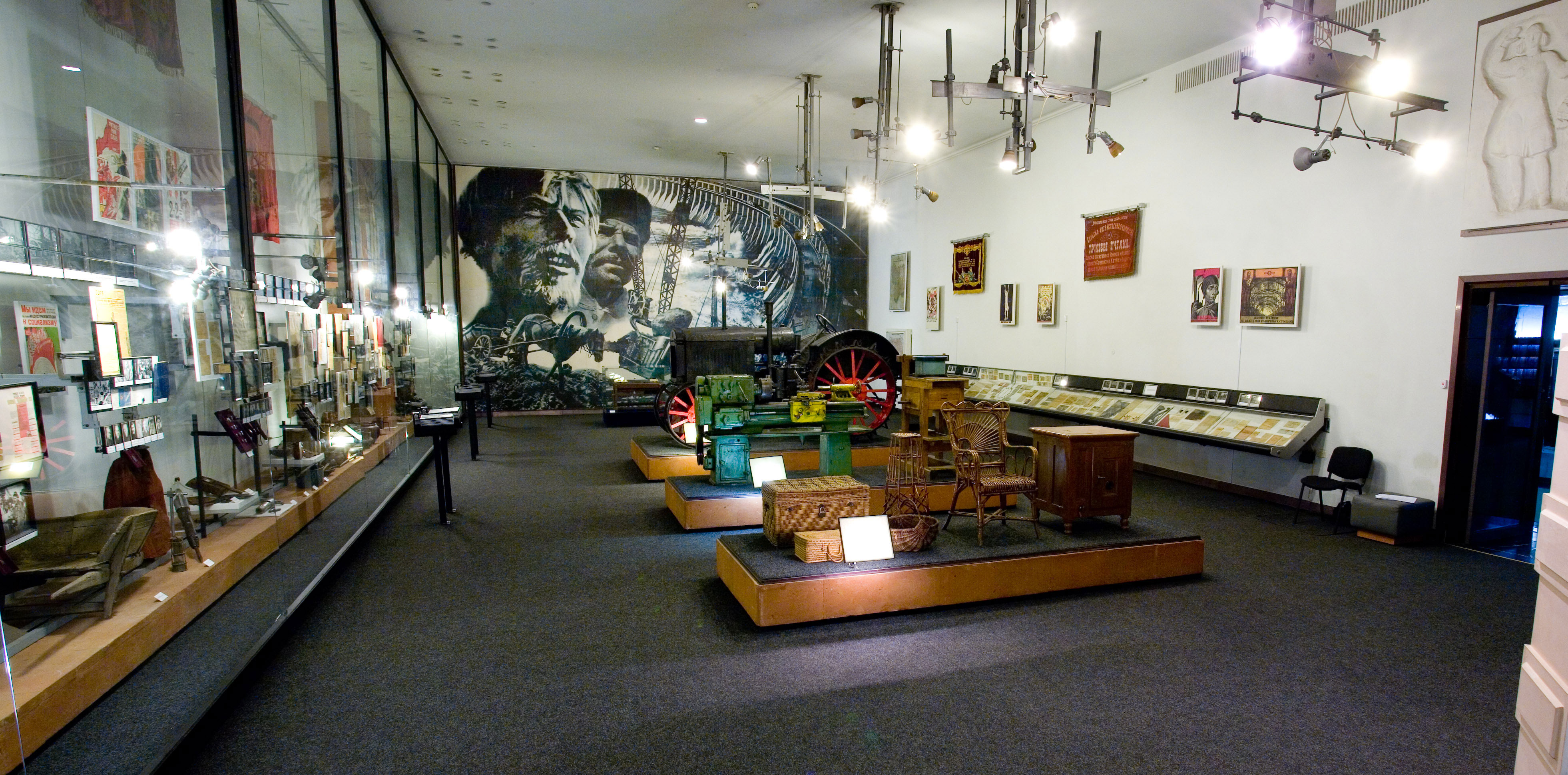 Зала №6. Історія краю у 1922-1939 роках